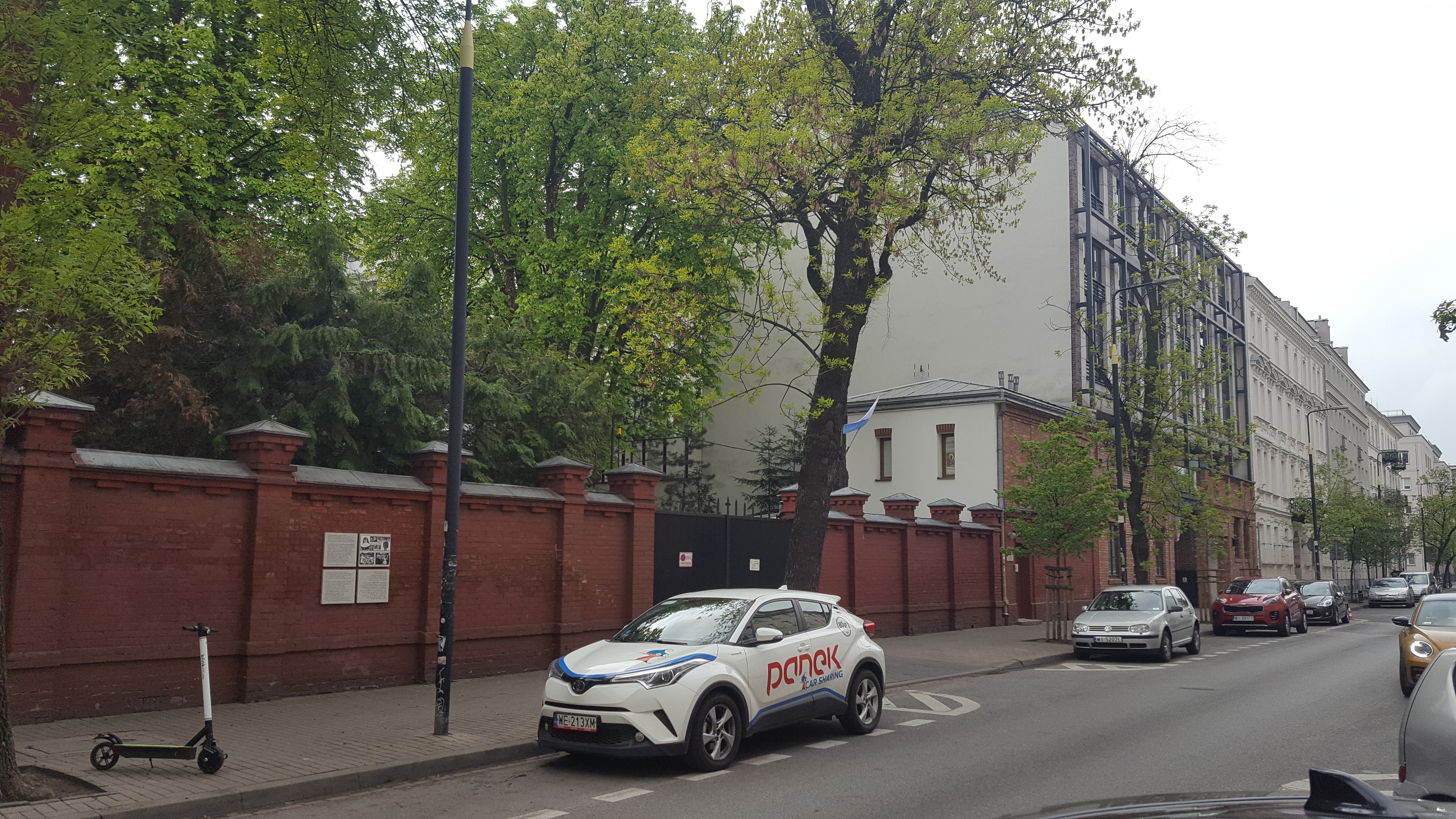 Klasztor Zgromadzenia Franciszkanek Rodziny Maryi w Warszawie, przy ul. Hożej 53